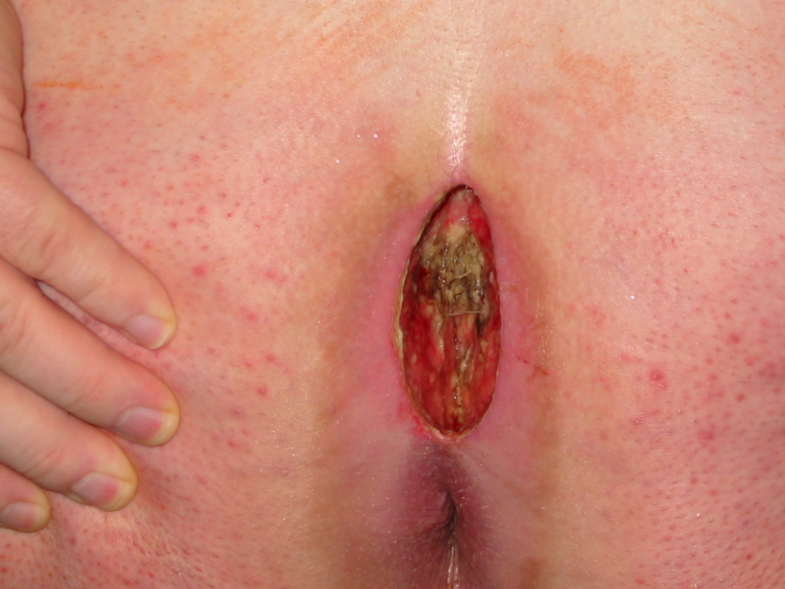 Eine behandelte Steissbeinfistel ca. drei Tage nach der Operation